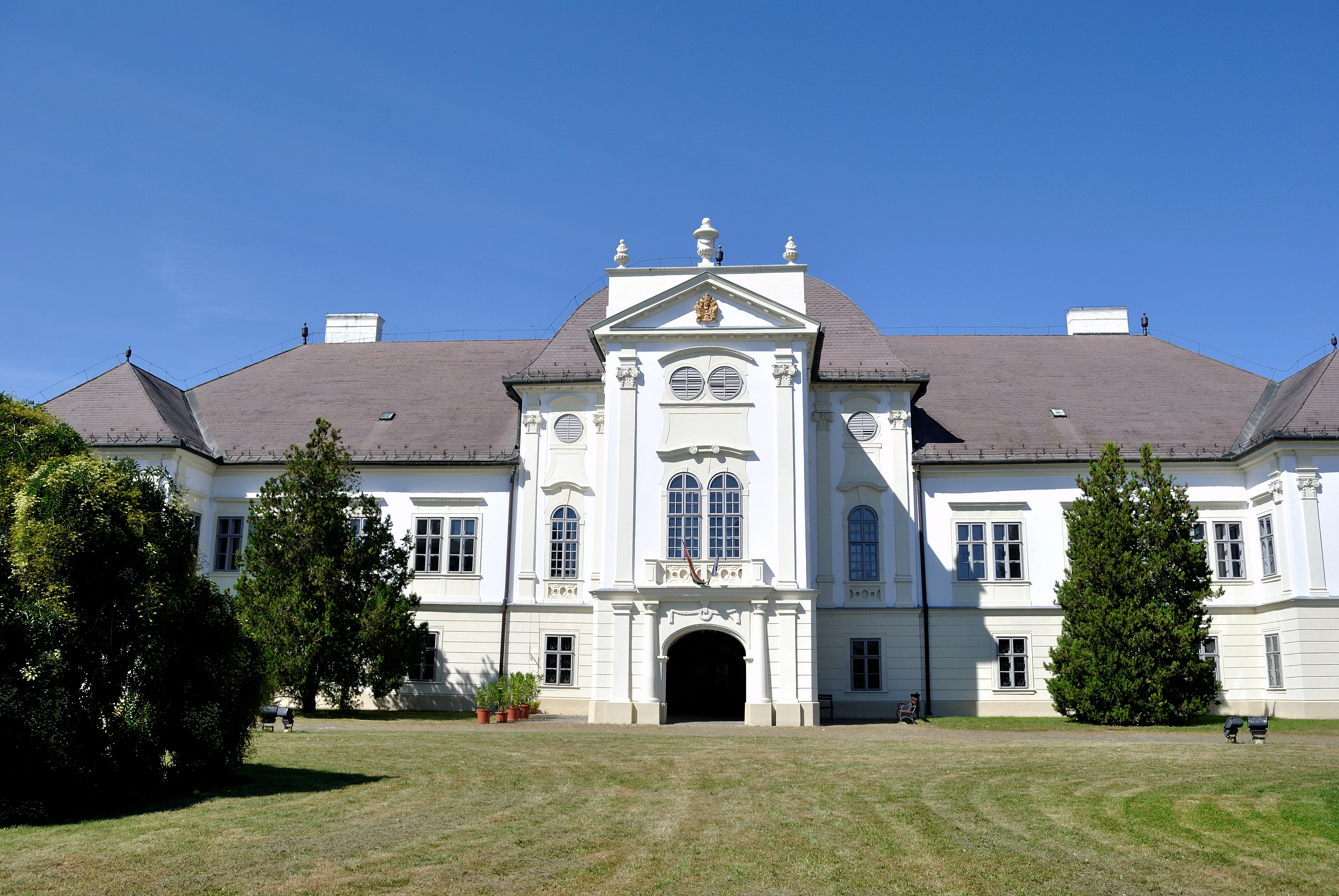 v. Forgách-kastély (Szécsény, Ady Endre utca 7.) This is a photo of a monument in Hungary, Identifier: 6807